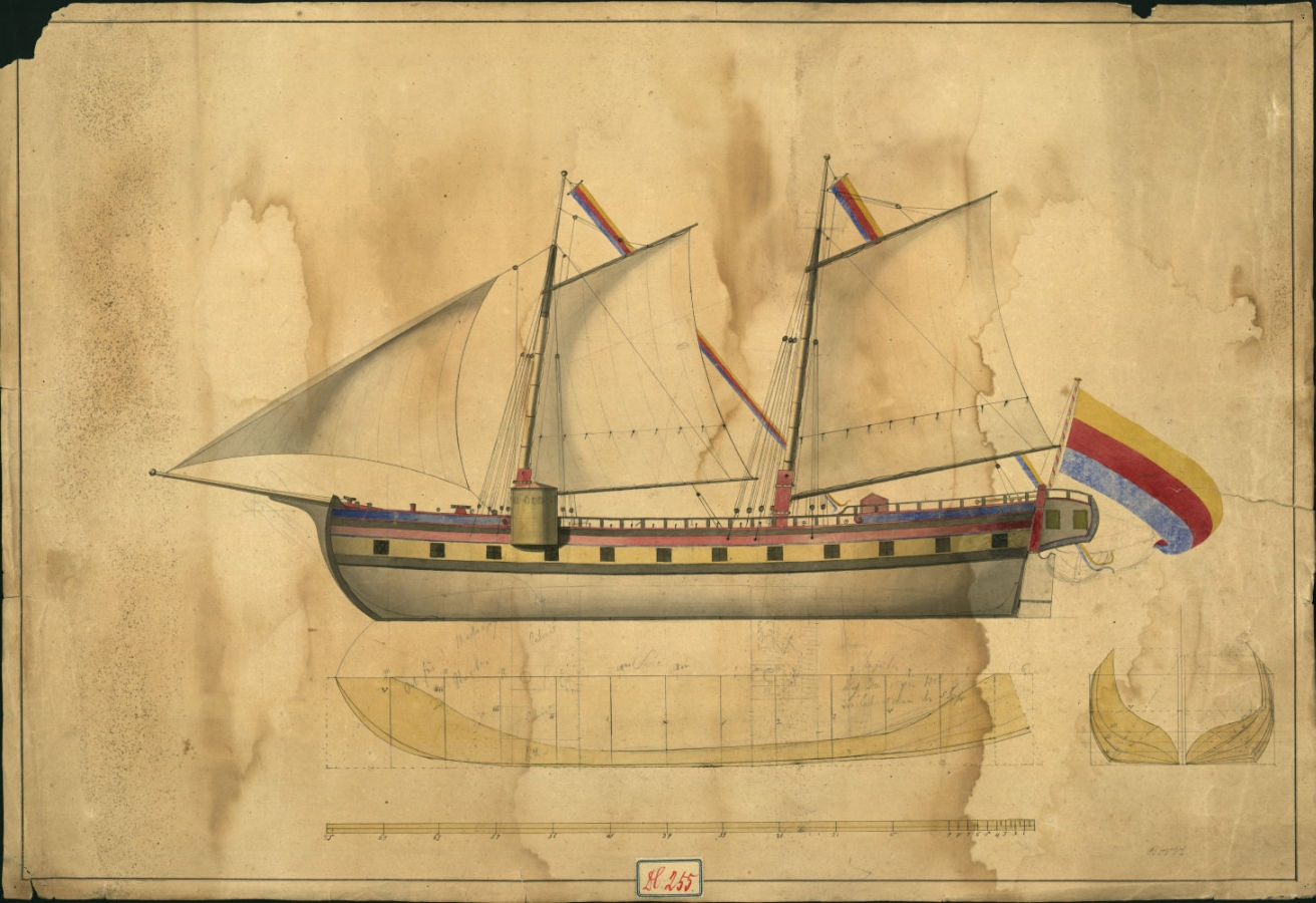 Kristóf balatoni sószállító vitorlás bárka A Balaton első nagy teherszállító vitorlását, a Kristóf nevű hajót 1753-ban bocsátották vízre. A „sóhajó”, vagyis a sószállító gálya szélcsend idején evezővel is haladhatott, Balatonkeneséről szállította a sót Keszthelyre, visszafelé pedig fát, bort és egyéb termékeket vitt. Az 1790-es években Festetics György (1755-1819) kezdett nagyszabású hajóépítésbe. Ekkor került Bori Antal (1764-1835) trieszti „tanult hajós-mester” Fenékpusztára (ma Keszthely külterülete), és olasz hajóácsokkal hajóépítő üzemet hozott létre.